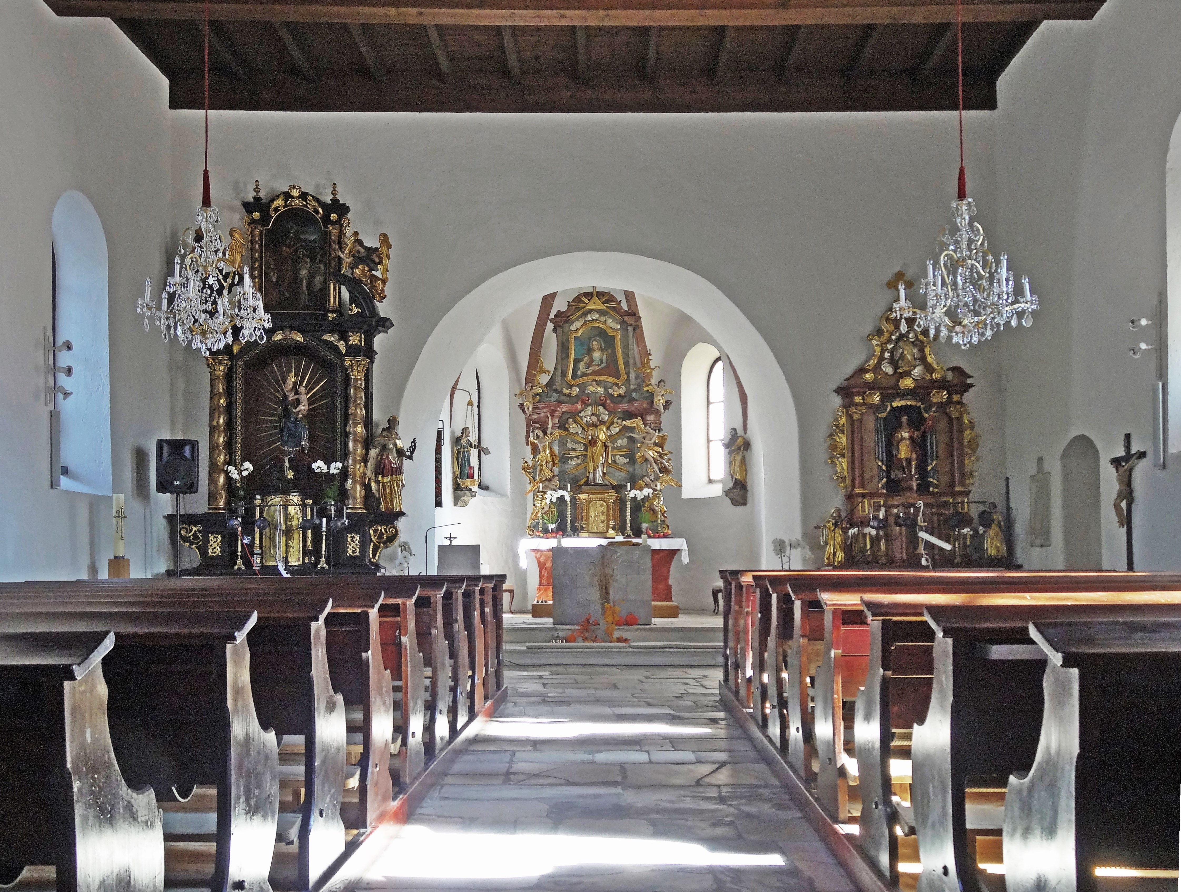 Kath. Pfarrkirche hl. Jakobus d. Ä. (Gallizien), Innenansicht